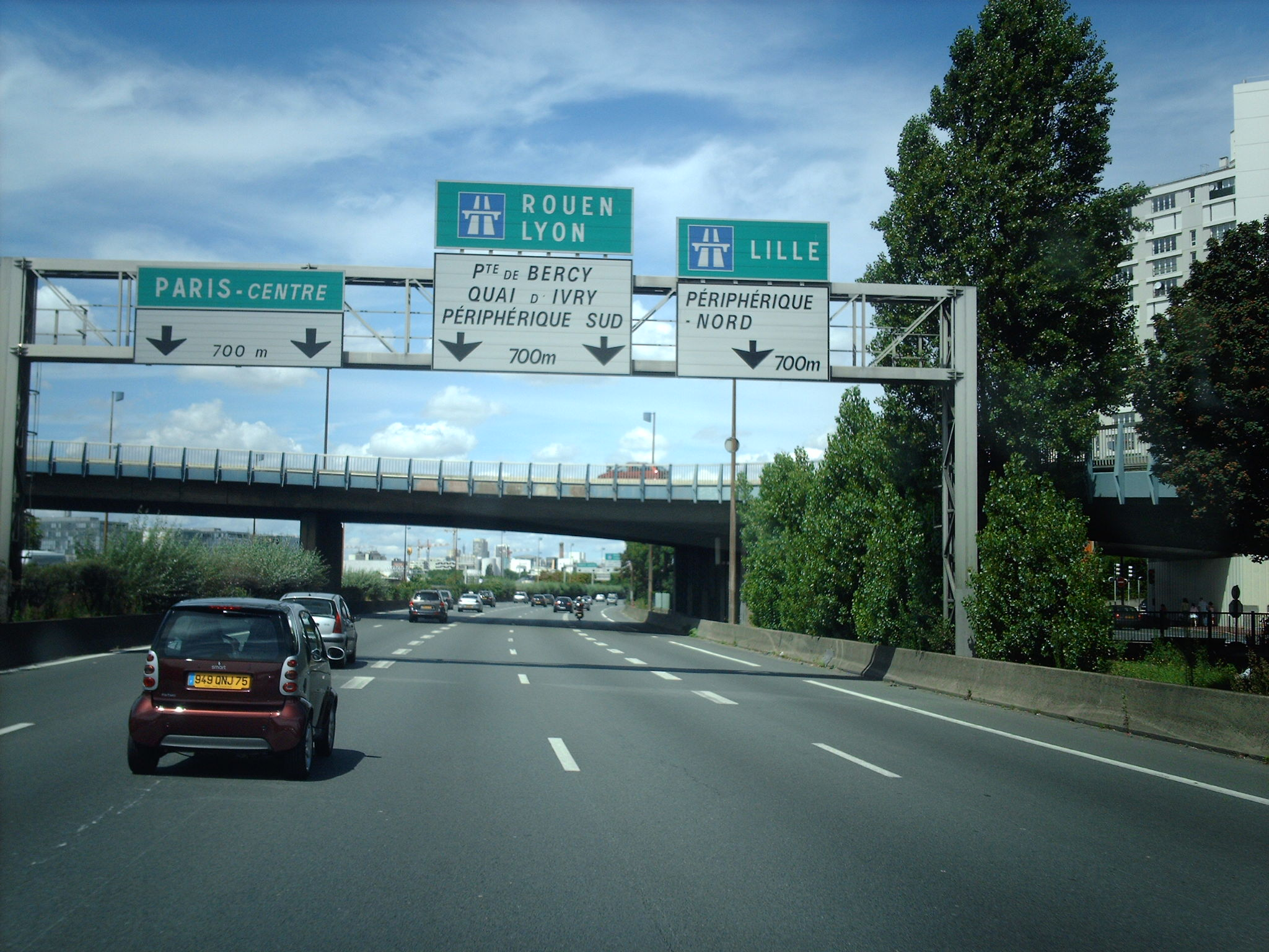 Echangeur entre l'A4 et le BP à l'entrée de Paris